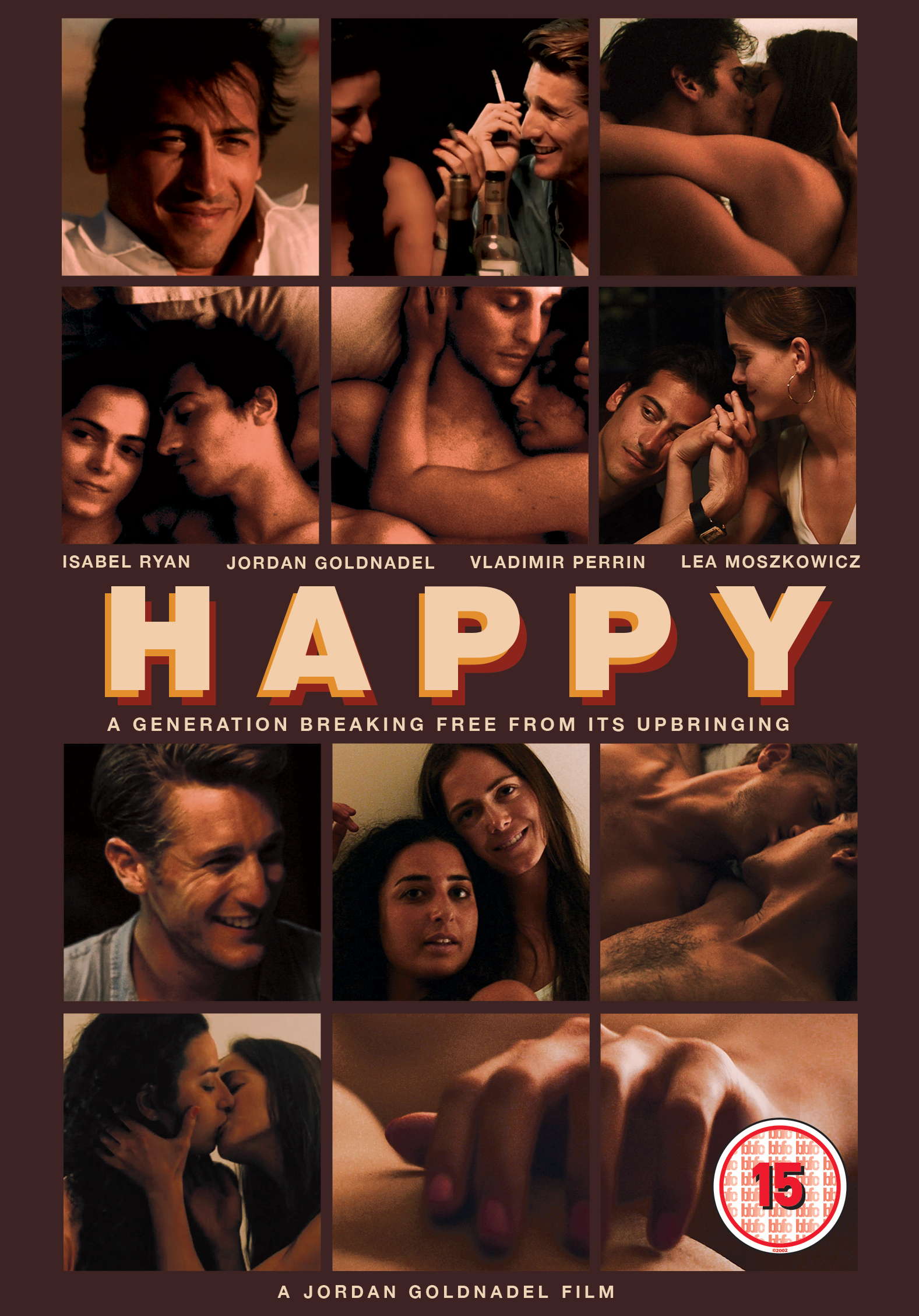 Affiche Anglaise de Happy de Jordan Goldnadel